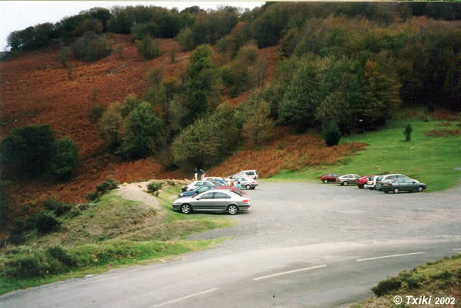 Col d'Ispeguy (Ispegi) entre la Basse-Navarre et la Navarre) Pyrénées).